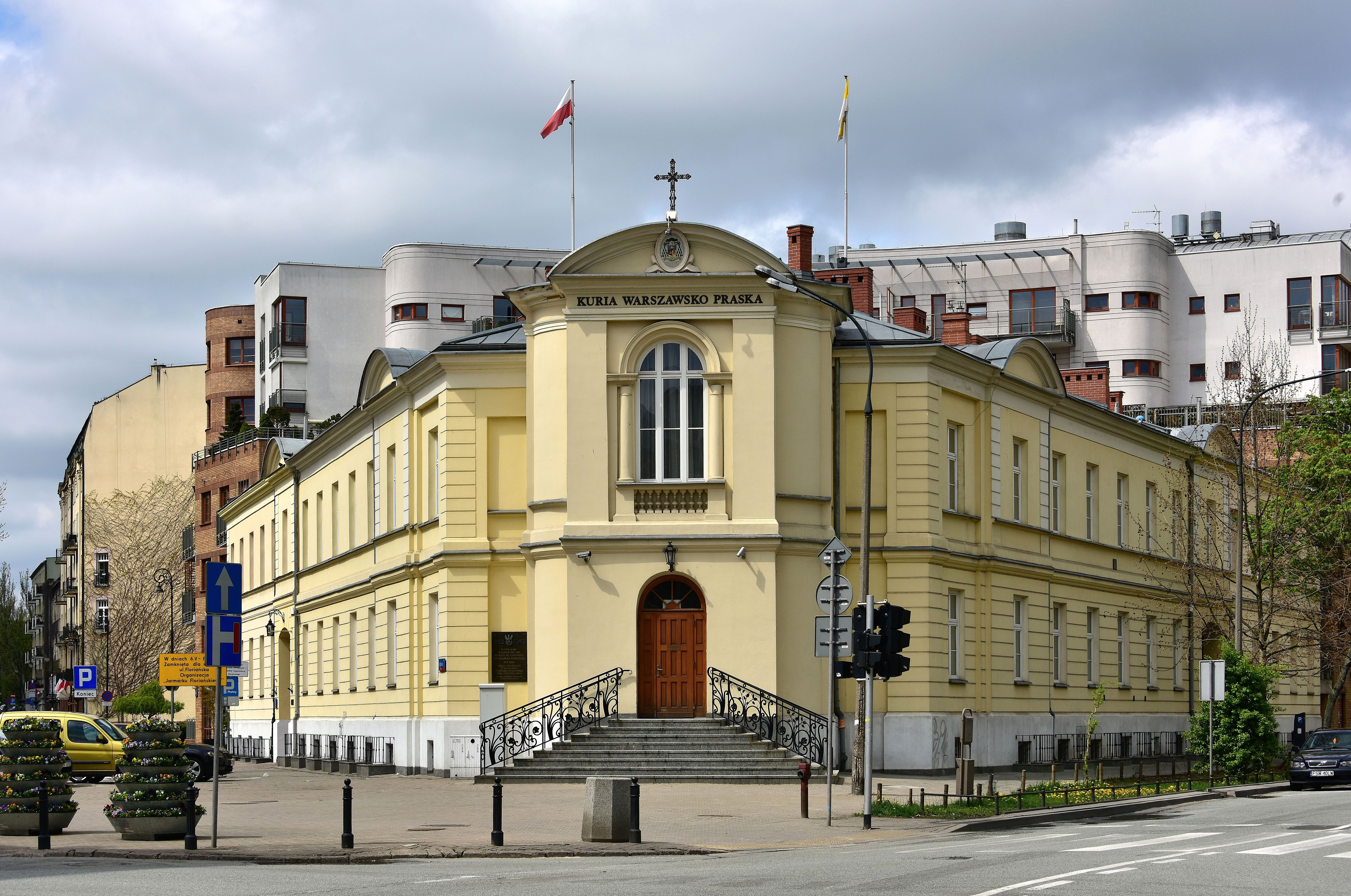 Gmach Zakładu dla Wdów po Poległych Żołnierzach i Oficerach przy ul. Floriańskiej 2/Jagiellońskiej 17 w Warszawie